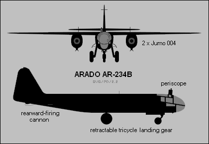 Ar-234B silhouette two-view